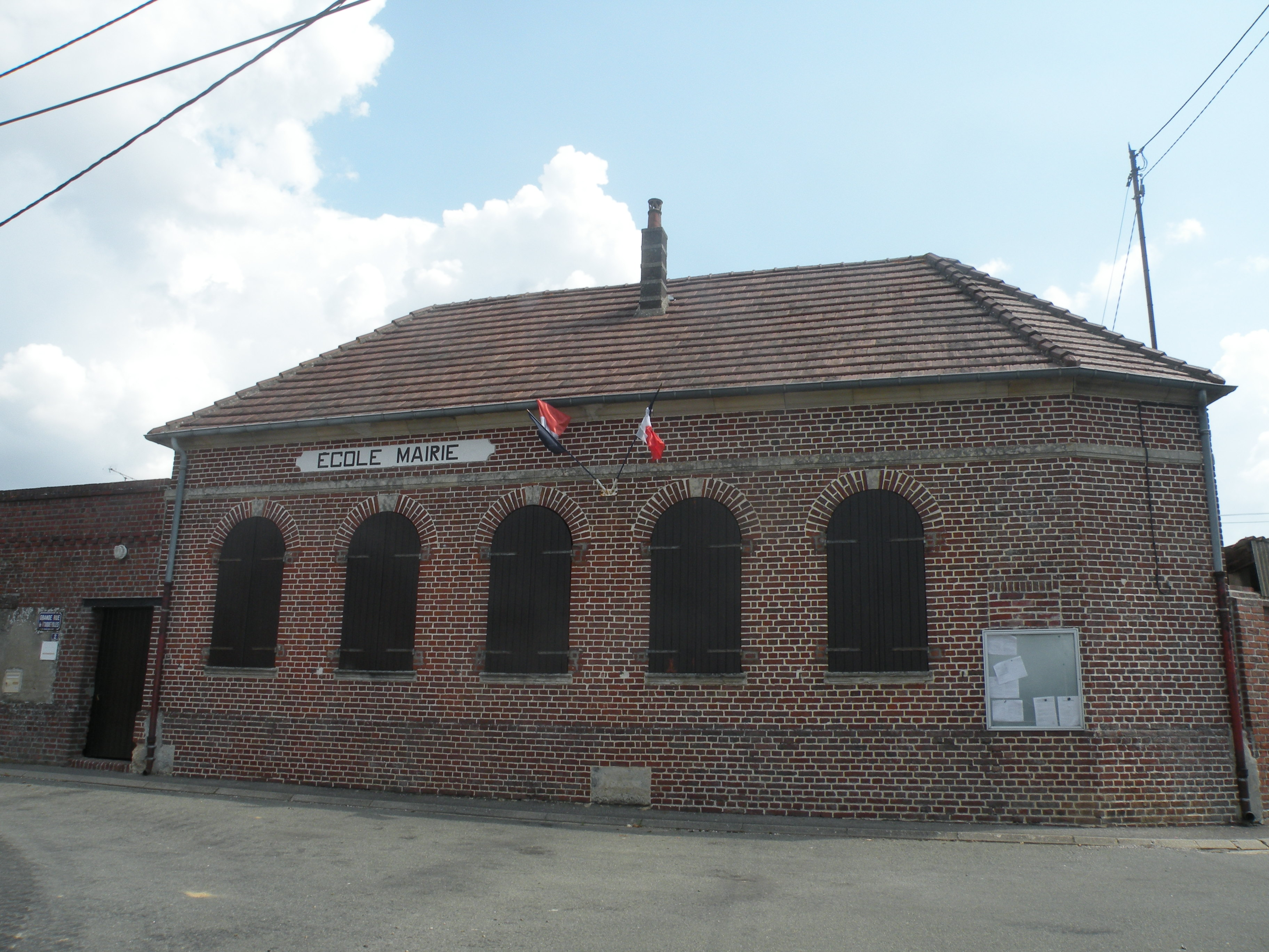 Fouquerolles mairie école